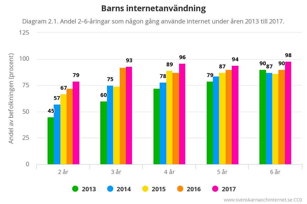 Andel svenska 2–6-åringar som någon gång använde internet under åren 2013 till 2017. Siffror från undersökningen "Svenskarna och internet 2017".